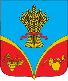 Герб Красногвардійського району